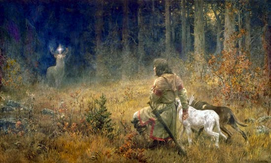 Die Bekehrung des Heiligen Hubertus